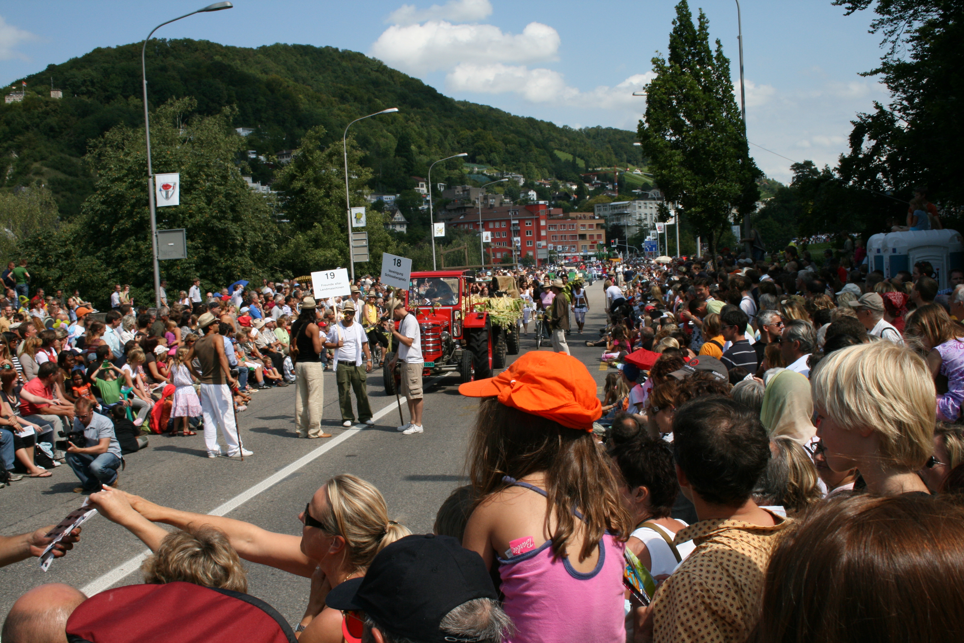 Umzug bei der Badenfahrt 2007 am 19.08.2007